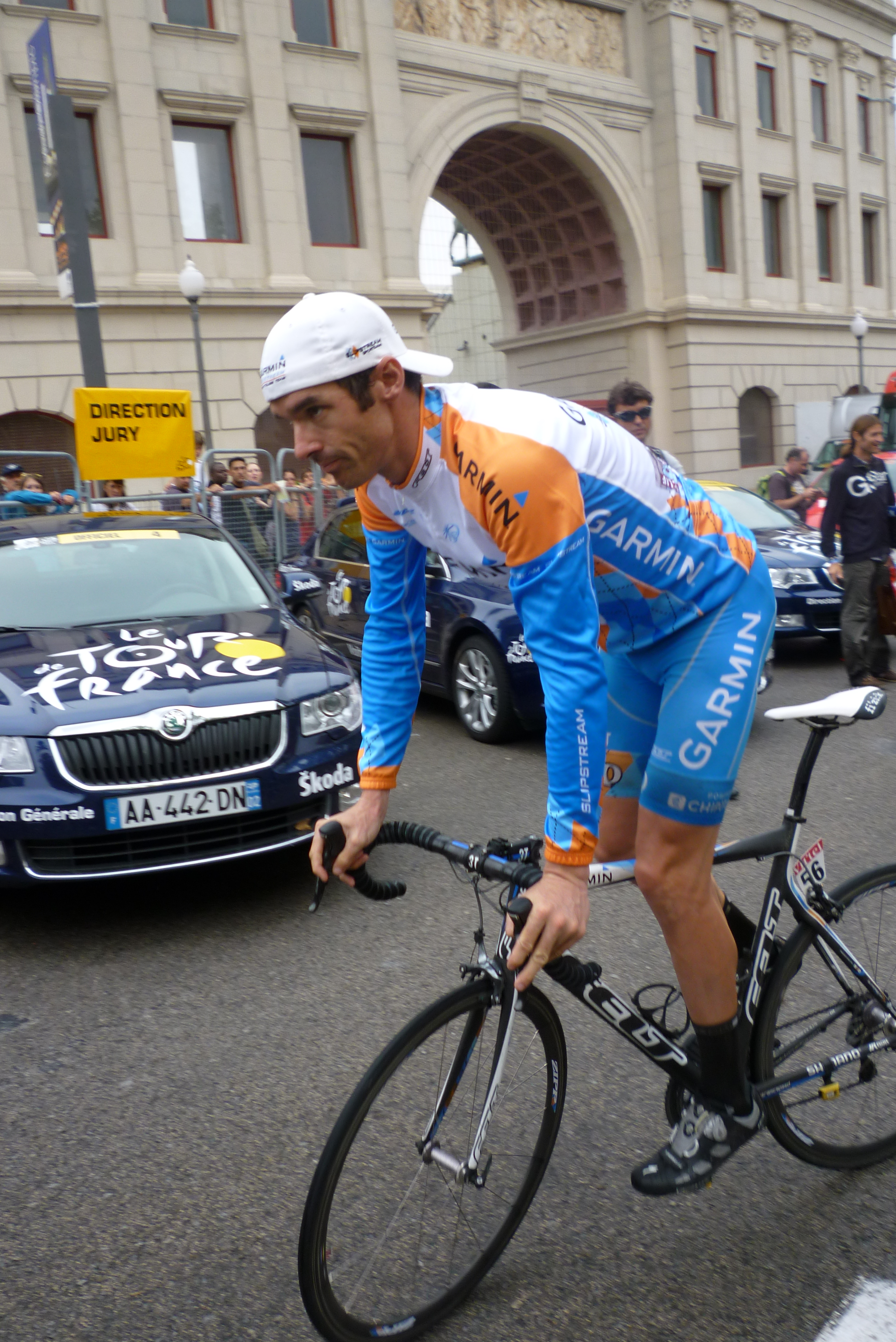 David Millar, Tour de France 2009, stage 6.